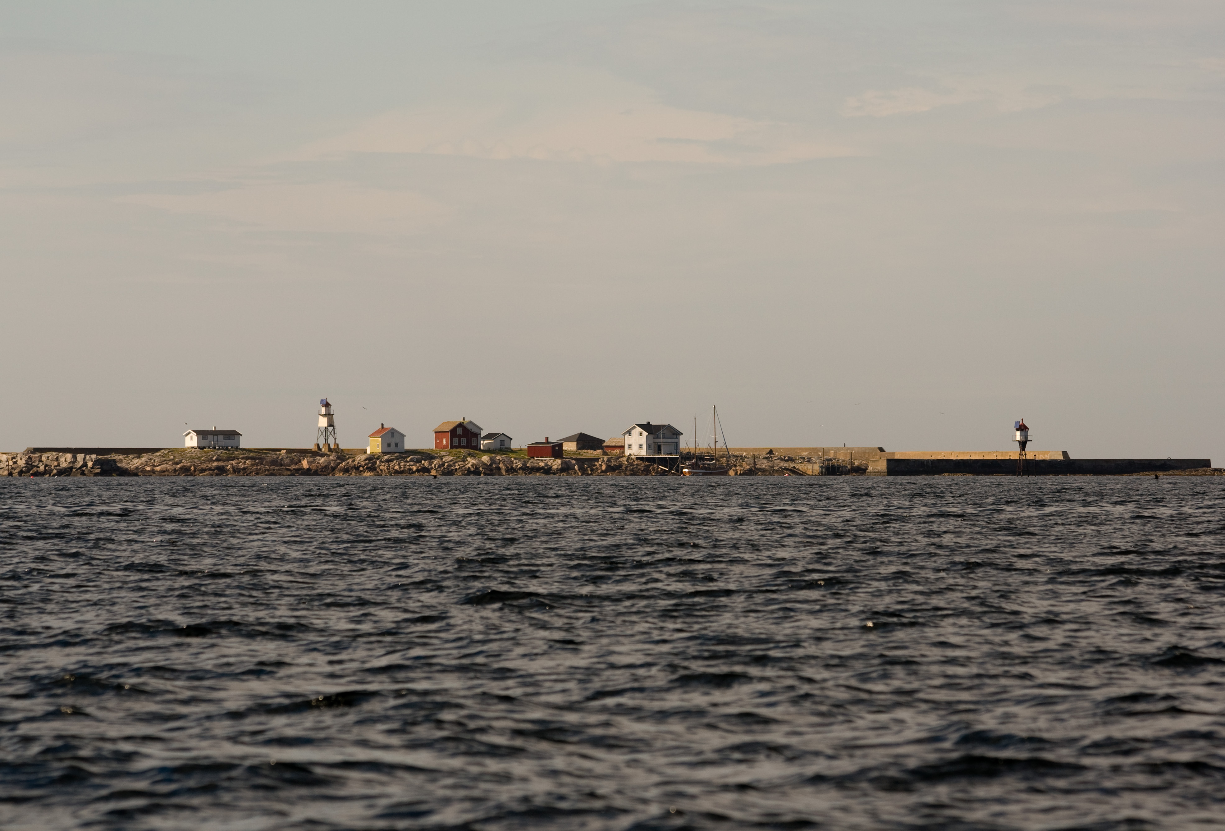 Kya in Frøya